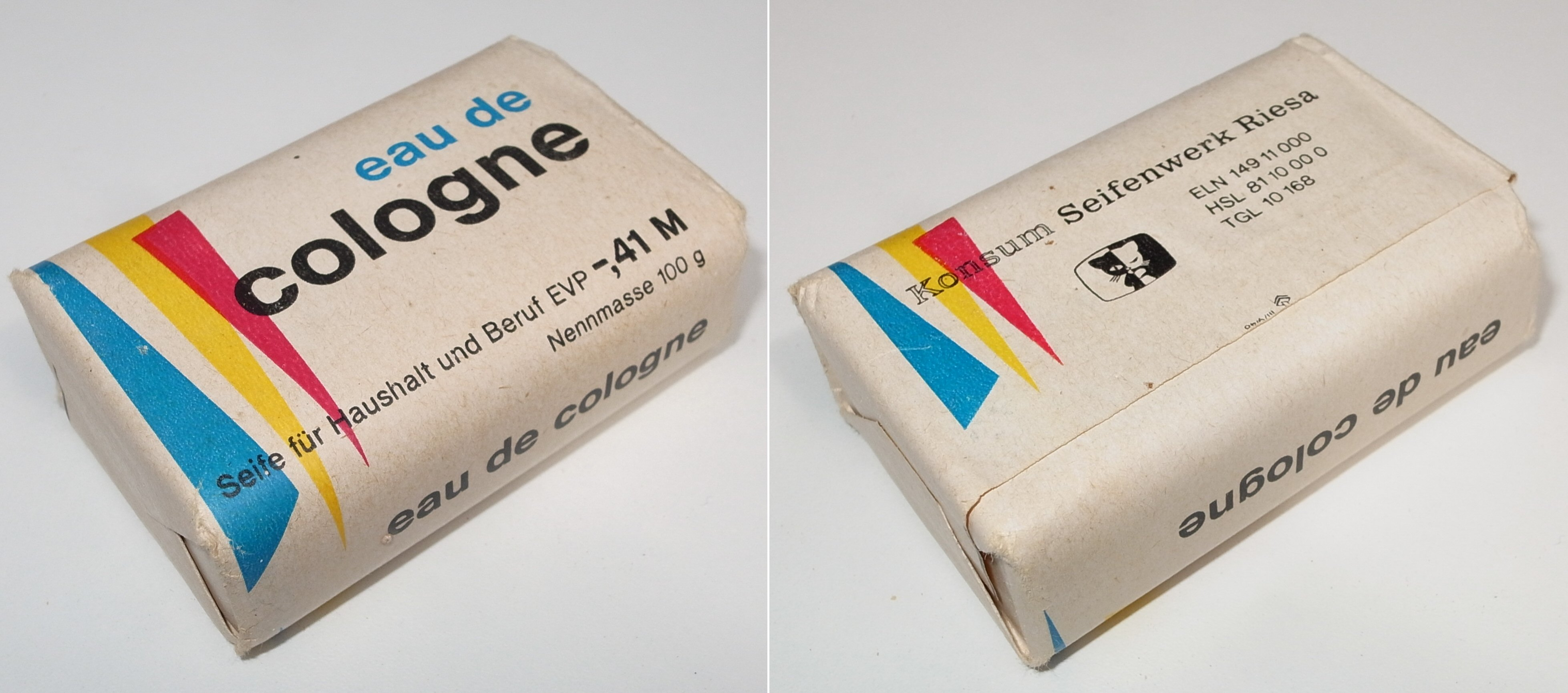 eau de cologne,Hersteller Konsum Seifenwerk Riesa